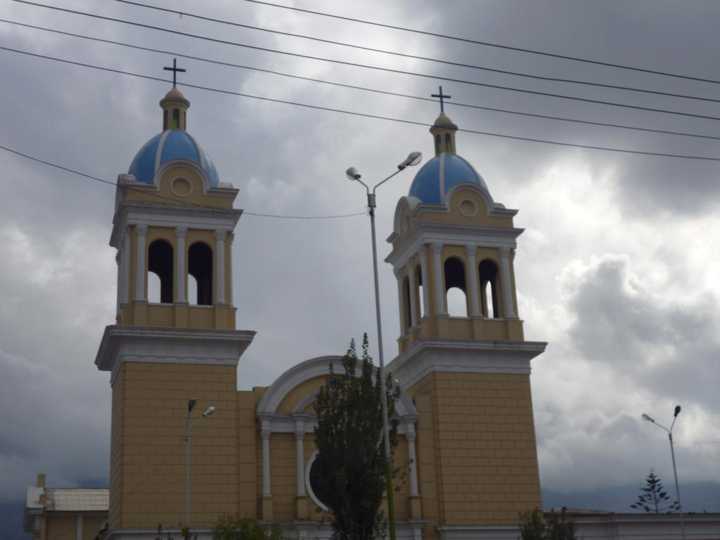 Inmaculada iglesia Huancayo, Peru por Richard Weiss